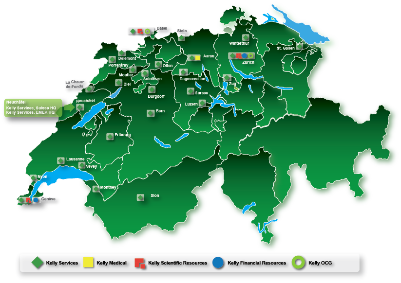 Carte des succursales Kelly Services (Suisse) SA